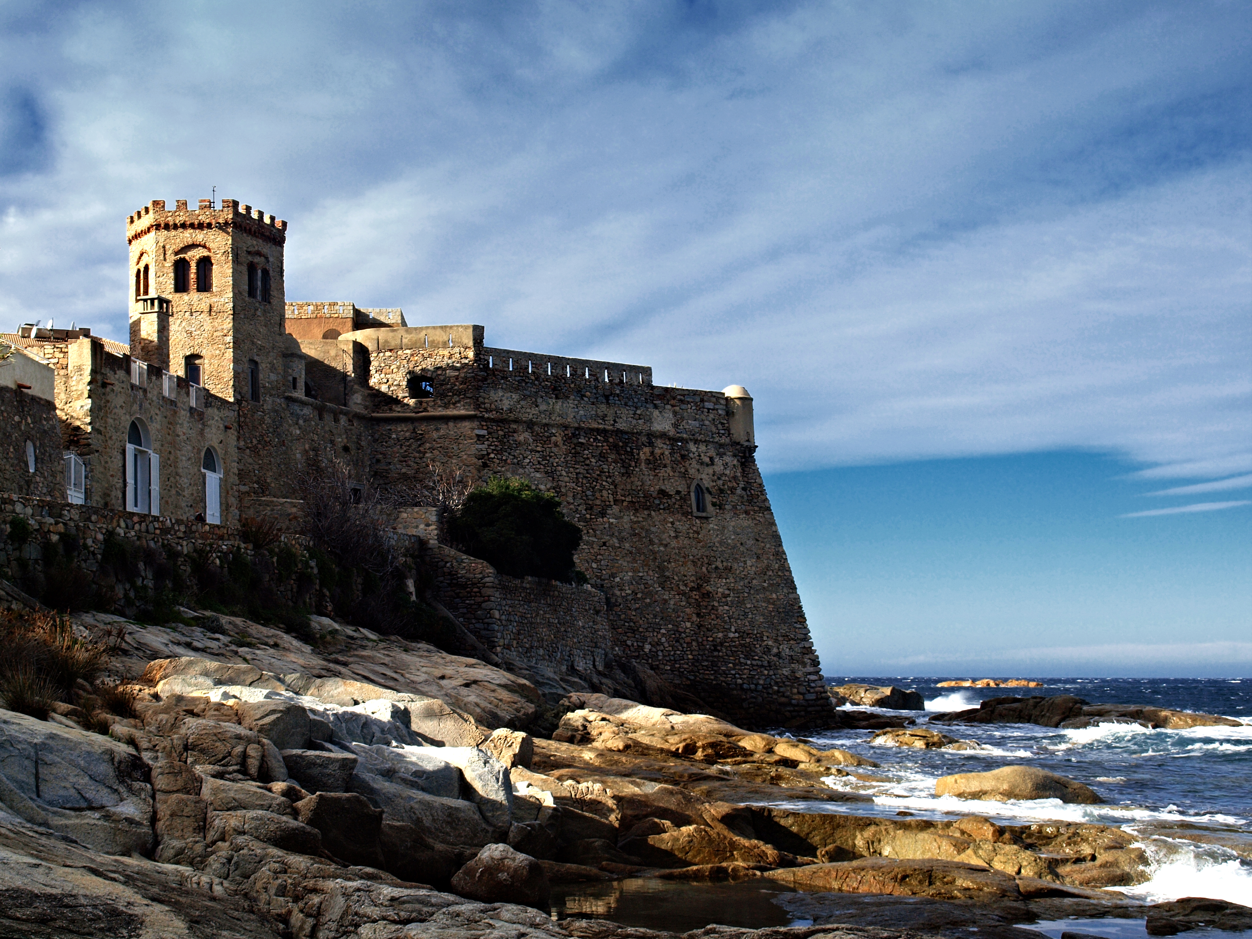 Algajola (Corsica)- Vue du fort (U Castellu) XVIe siècle